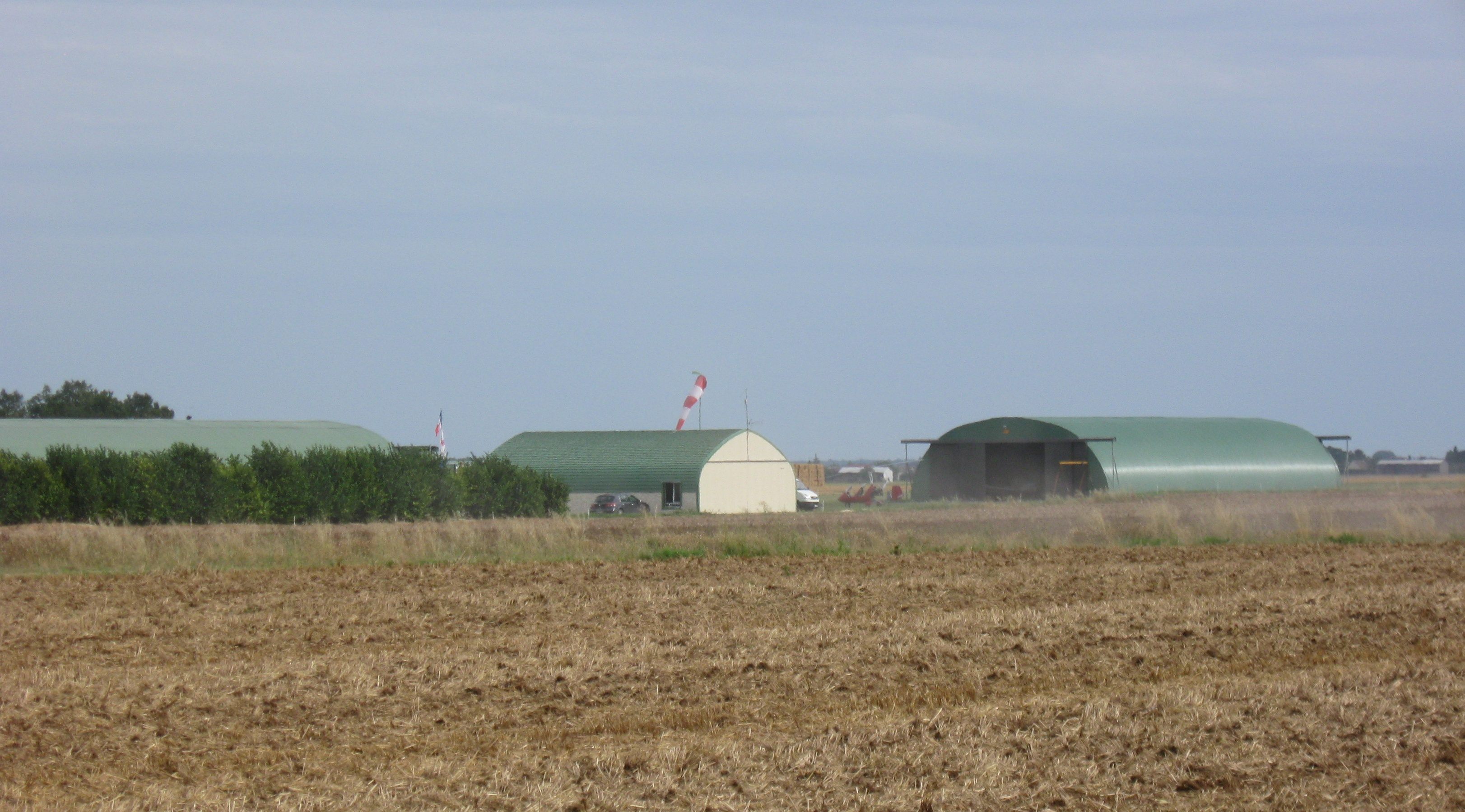 La base ULM de Mondreville. (département de la Seine-et-Marne, région Île-de-France)